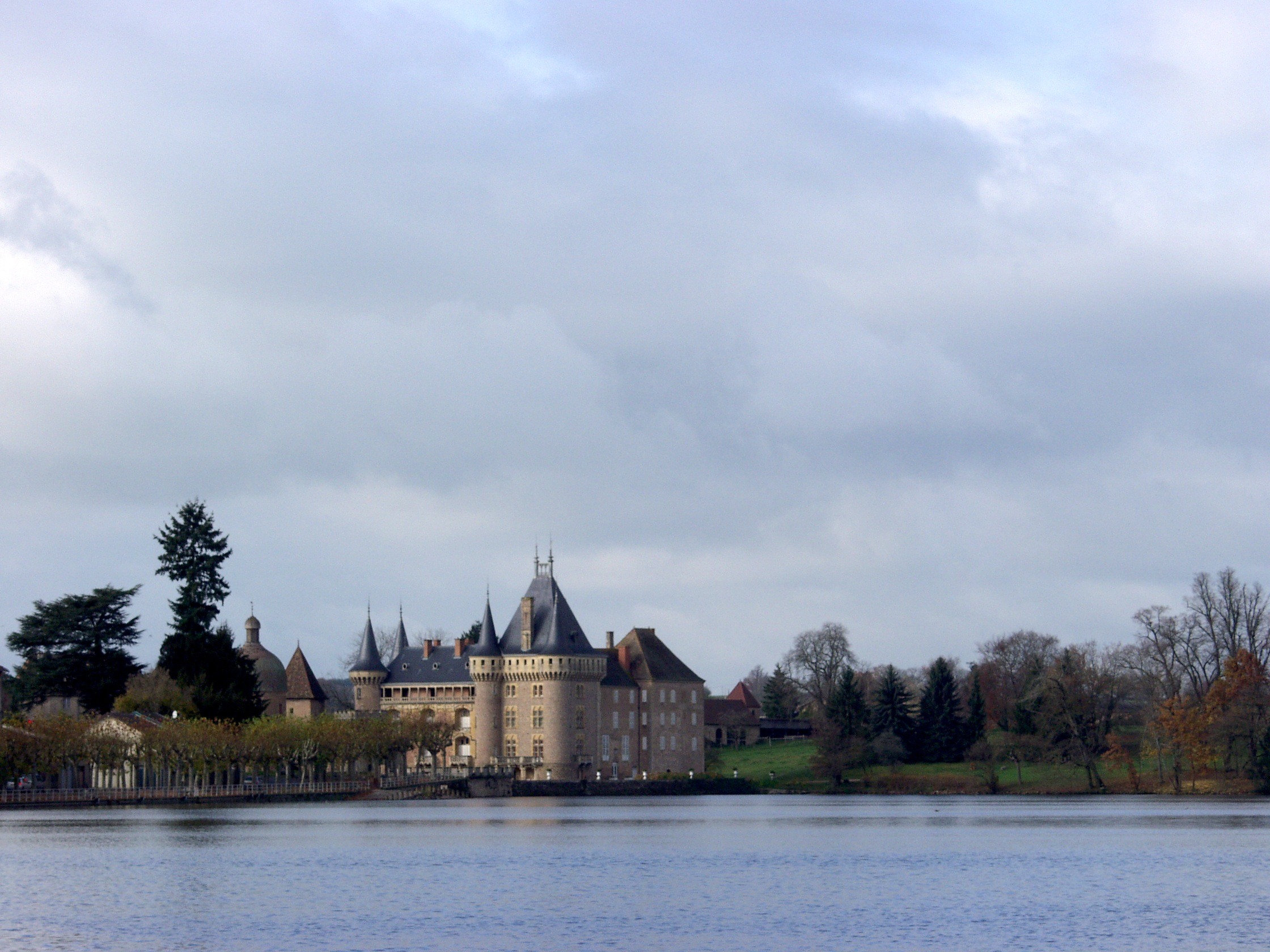 Château de La Clayette - XIVème-XIXème siècle